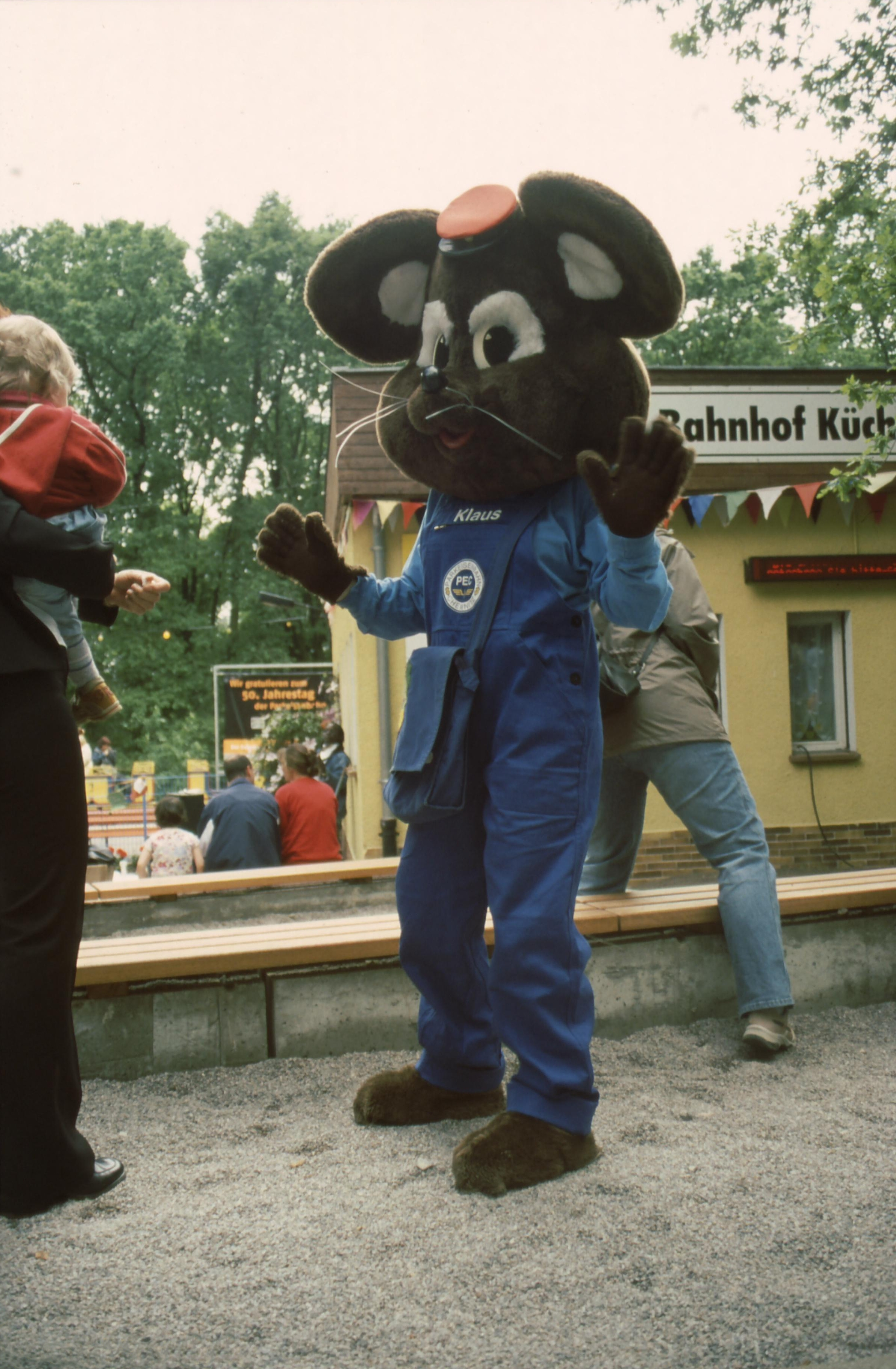 Die Parkeisenbahn Chemnitz schaffte sich ein Maskottchen an. Jährlich lädt die "Parkbahnmaus Klaus" zum Maskottchentreffen ein.